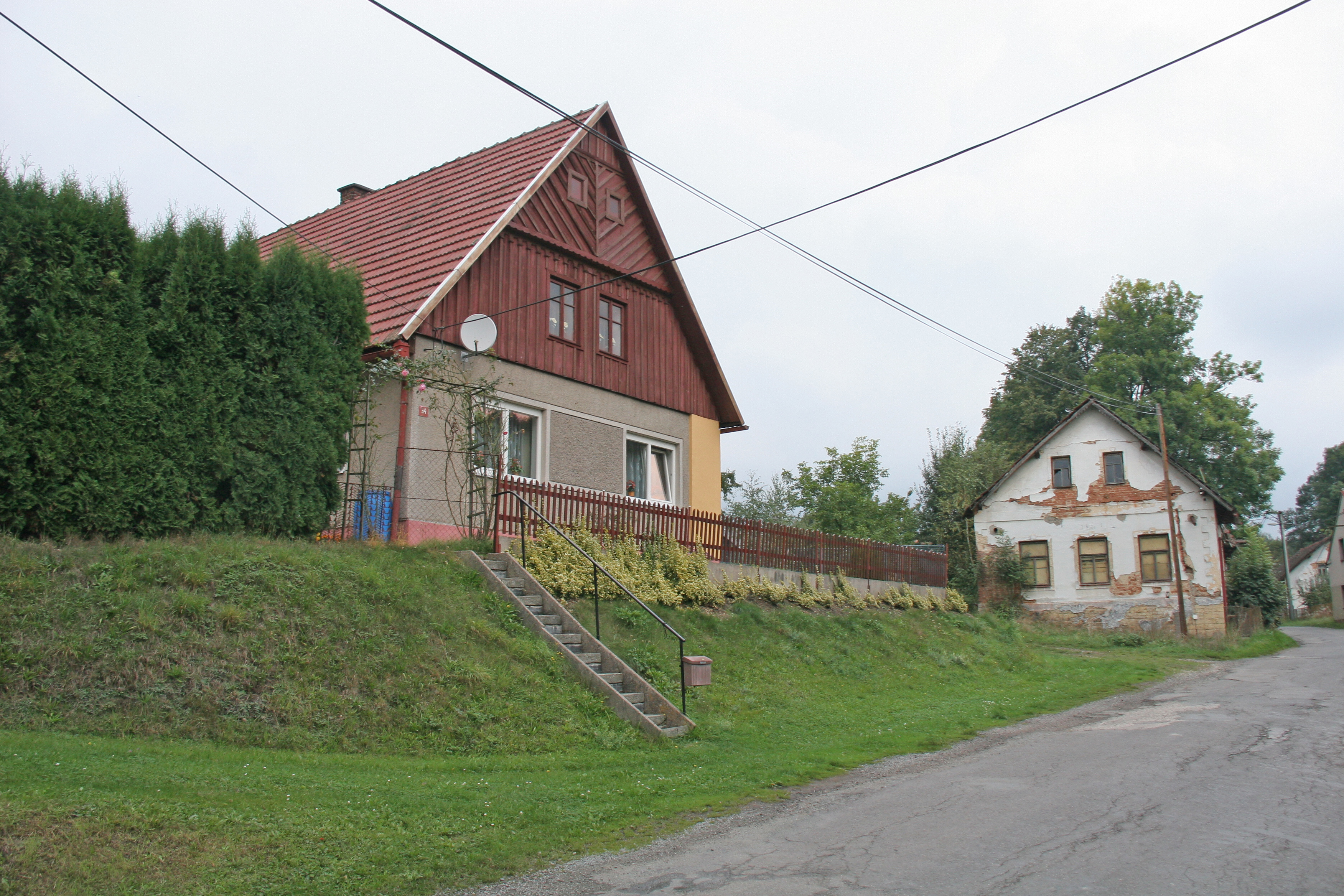 Mezilečí čp. 54